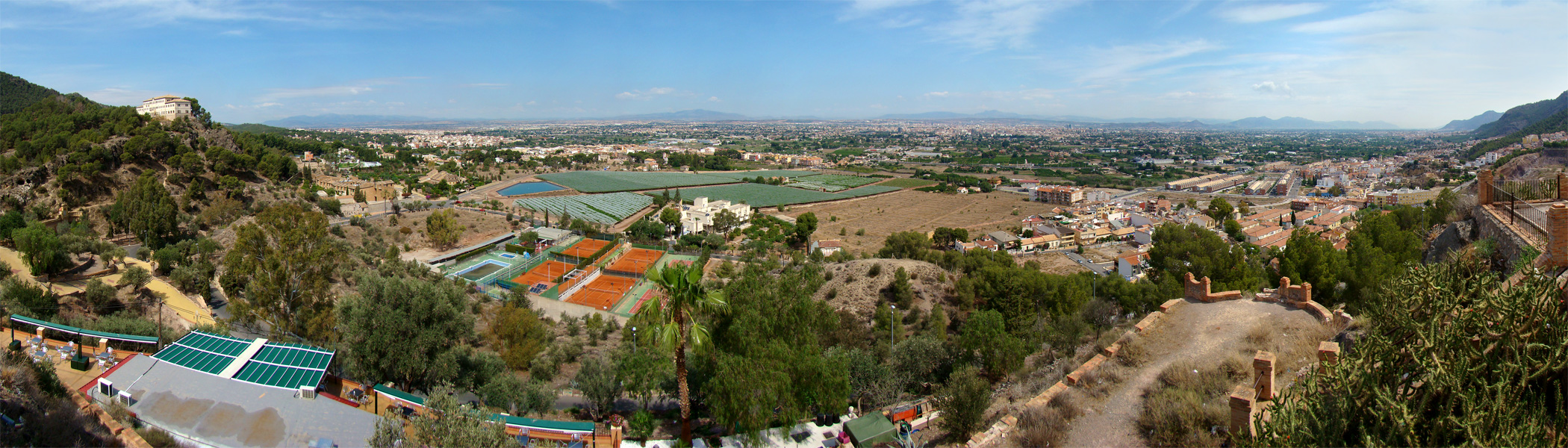 Murcia, Región de Murcia, España.